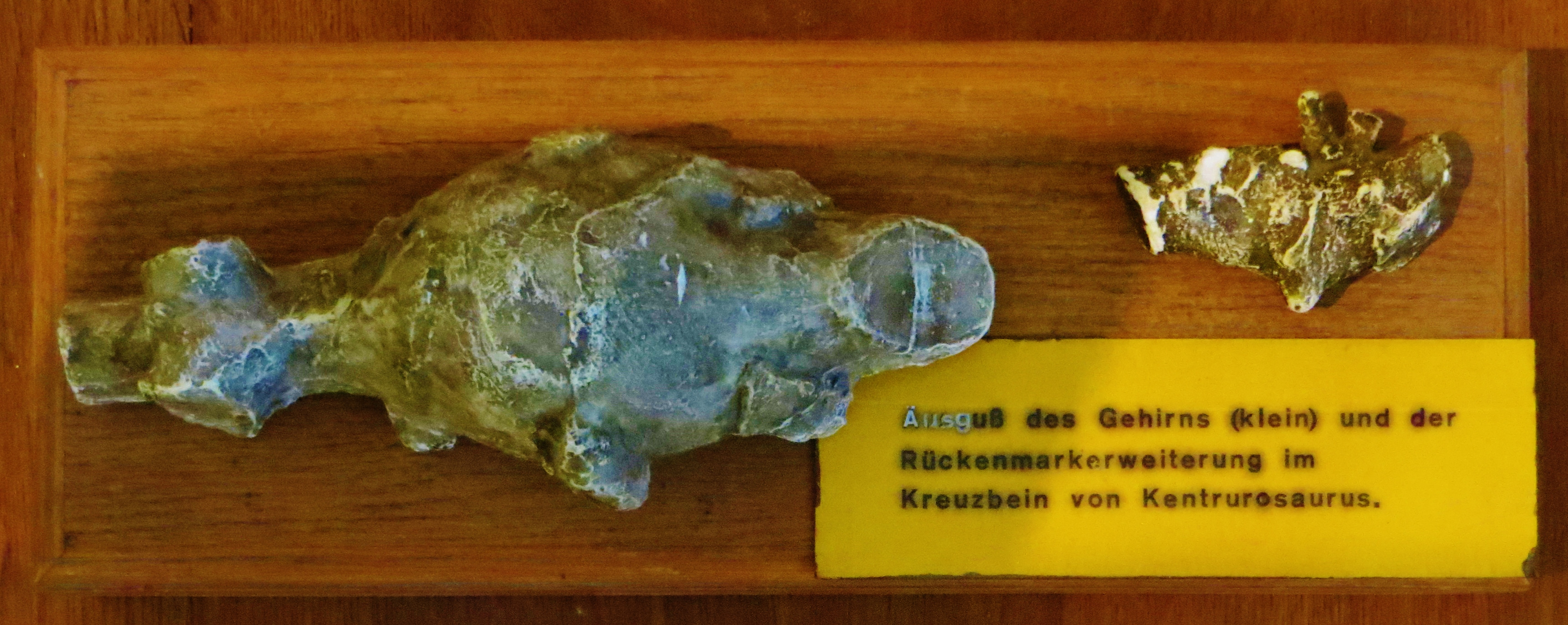 Fossil of Kentrosaurus, an extinct reptile - Took the picture at Museum of Paleontology of Tuebingen